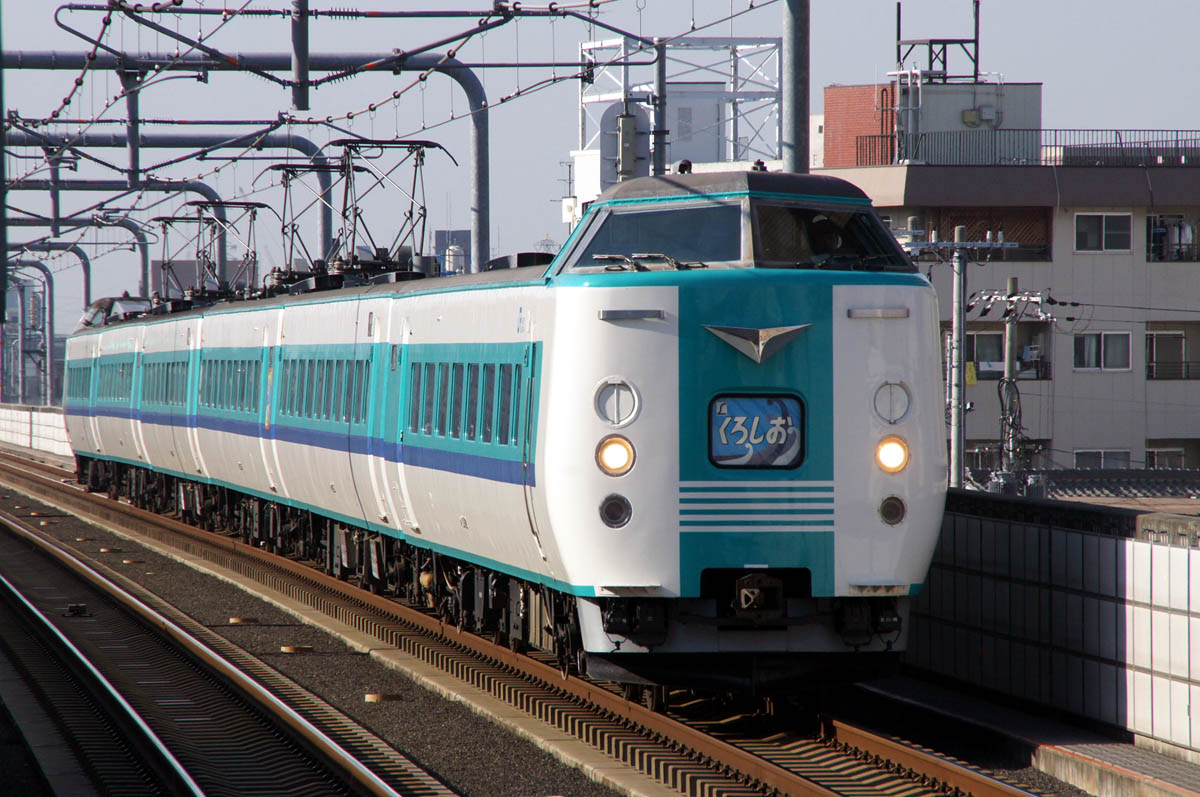 381系「くろしお」